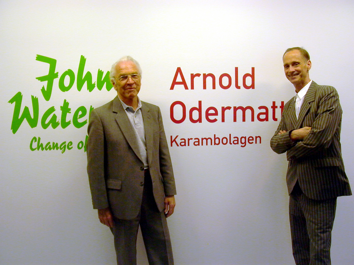 Arnold Odermatt (links im Bild) & John Waters (rechts), Vernissage Fotomuseum Winterthur